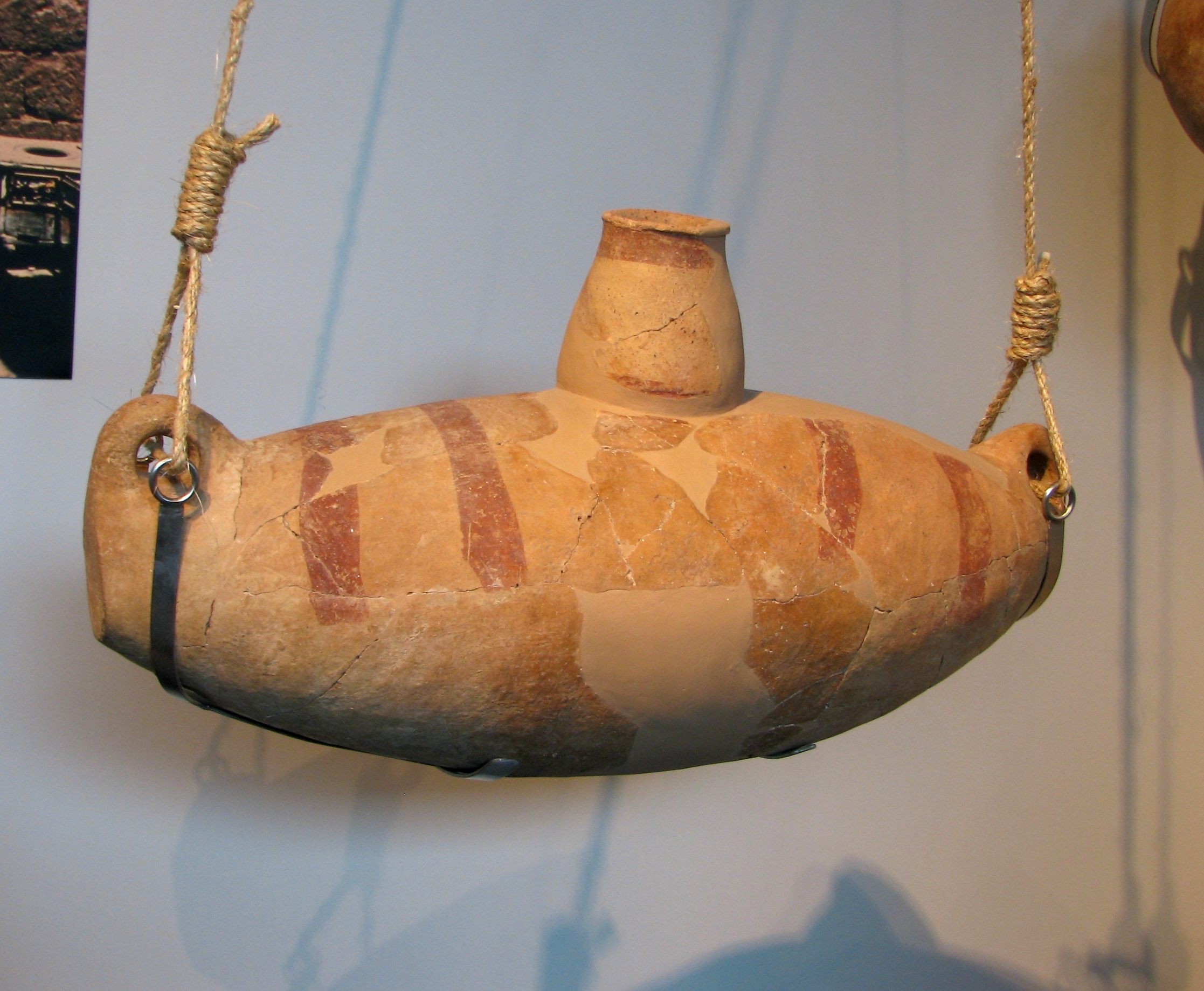 Chalcolithic churn מחבצה כלקוליתית מחבצה כלקוליתית גדולה מוציאון ישראל